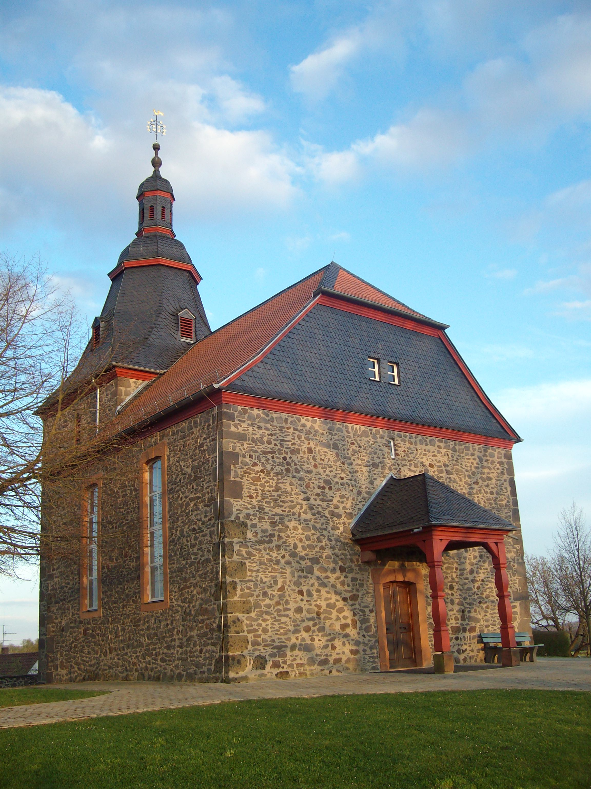 Evangelische Kirche Nonnenroth, Hungen, Landkreis Gießen, Hessen, Deutschland